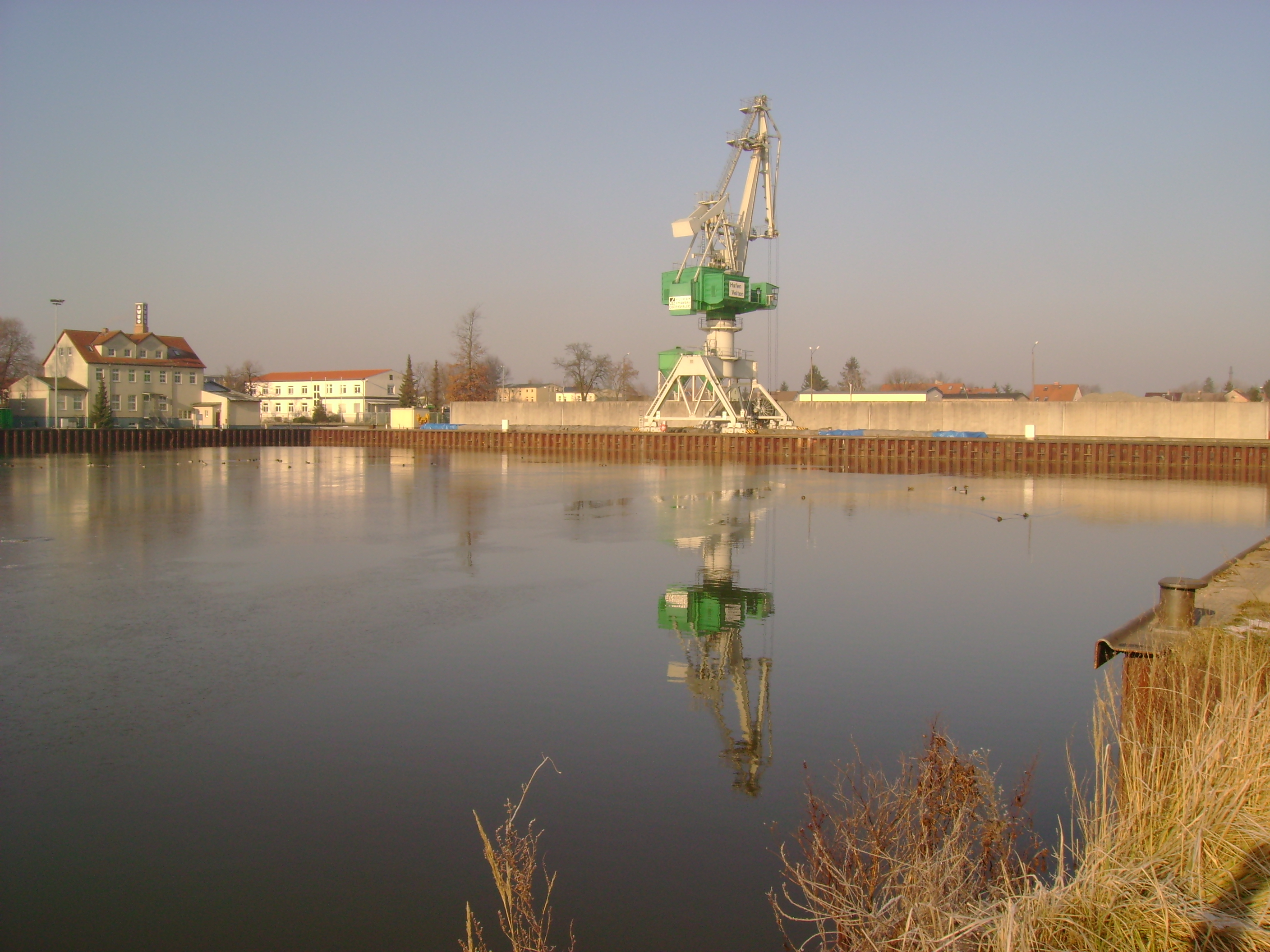 Hafen Velten, Januar 2011